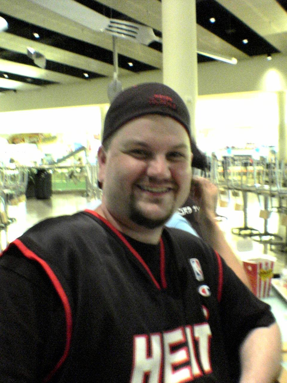 StankDawg, aka David Blake. Photograph taken by Elonka Dunin in Las Vegas, during Def Con 2006